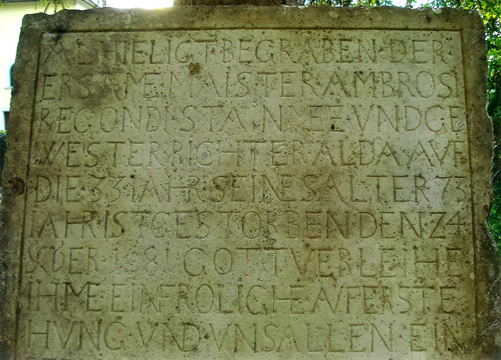 Grabplatte von Meister Ambrosius Regondi (1681).